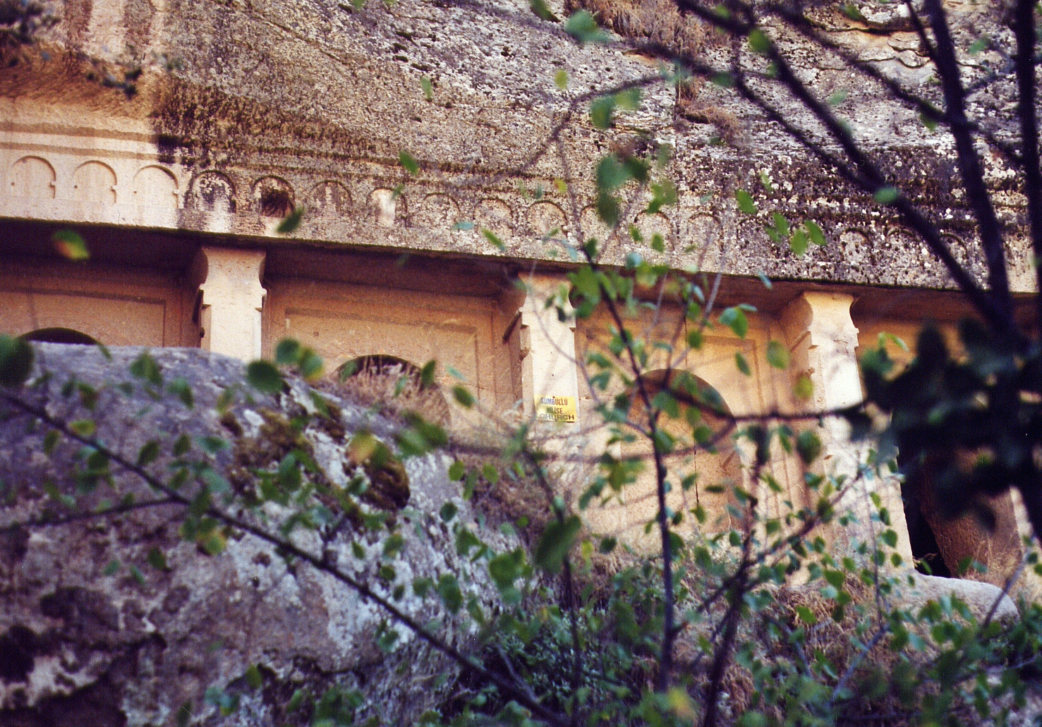 Fassade der Sümbüllü Kilise im Ihlara-Tal in Kappadokien, Zentraltürkei